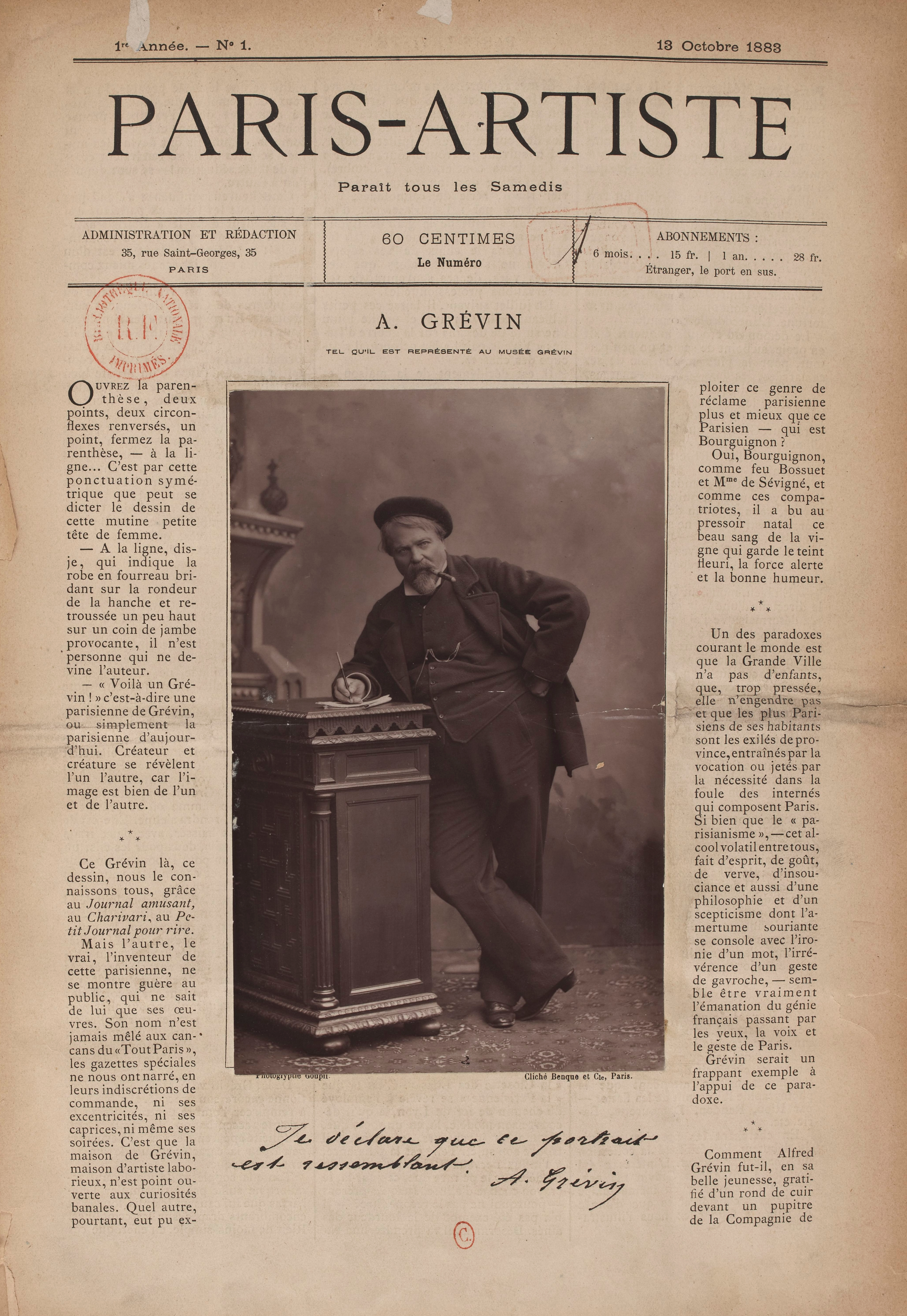 Hebdomadaire Paris-Artiste, n°1 du 13 octobre 1883. Photoglyptie (woodburytype) d'Alfred Grévin, phot Benque.